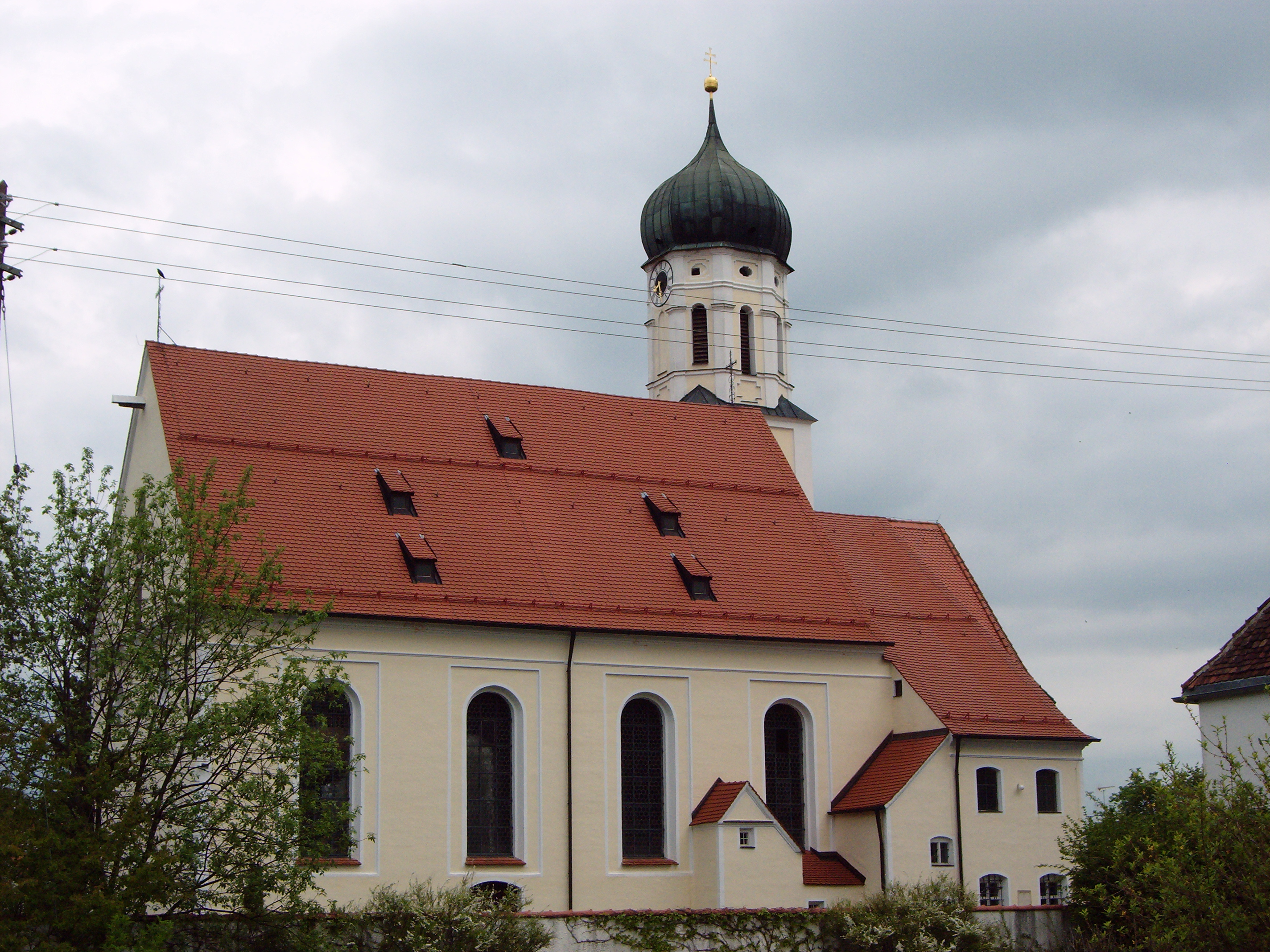 Church in Asch, Germany